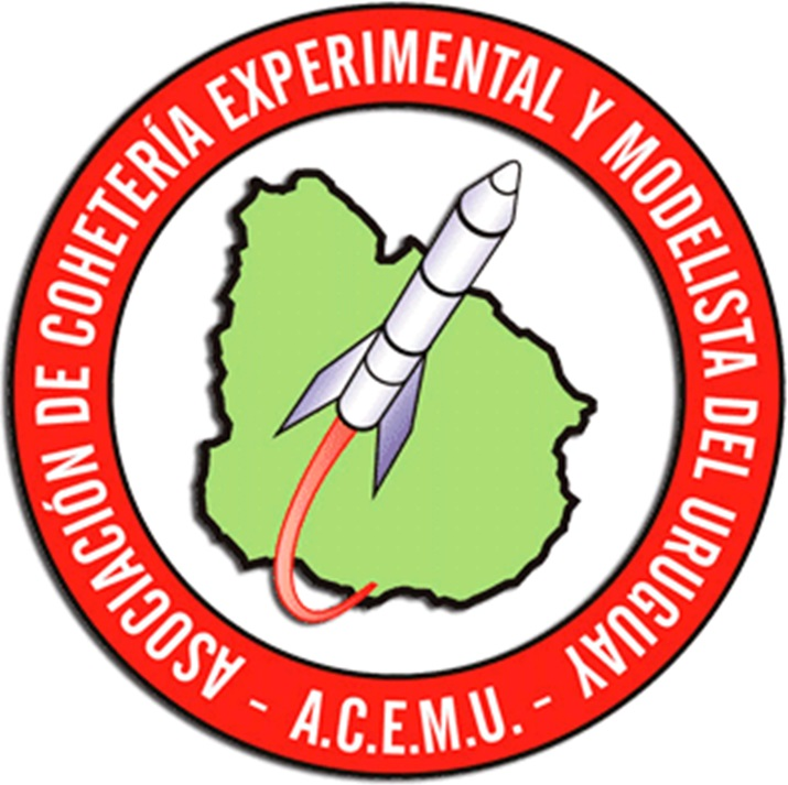 Logotipo de la Asociación de Cohetería Experimental y Modelista del Uruguay (ACEMU).